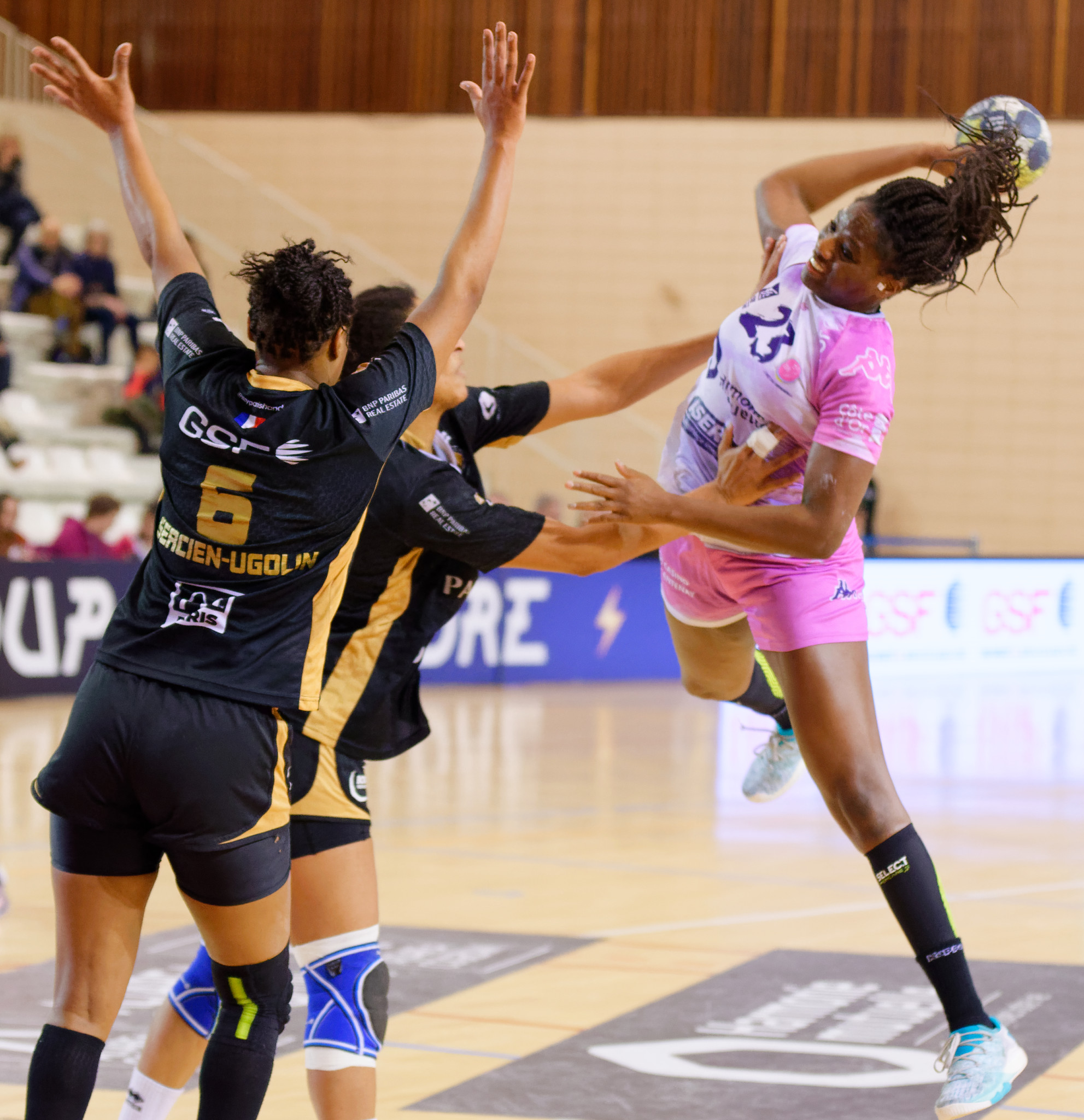 Rencontre entre Issy Paris Hand et Dijon. A Issy Les Moulineaux, le 25 février 2018.